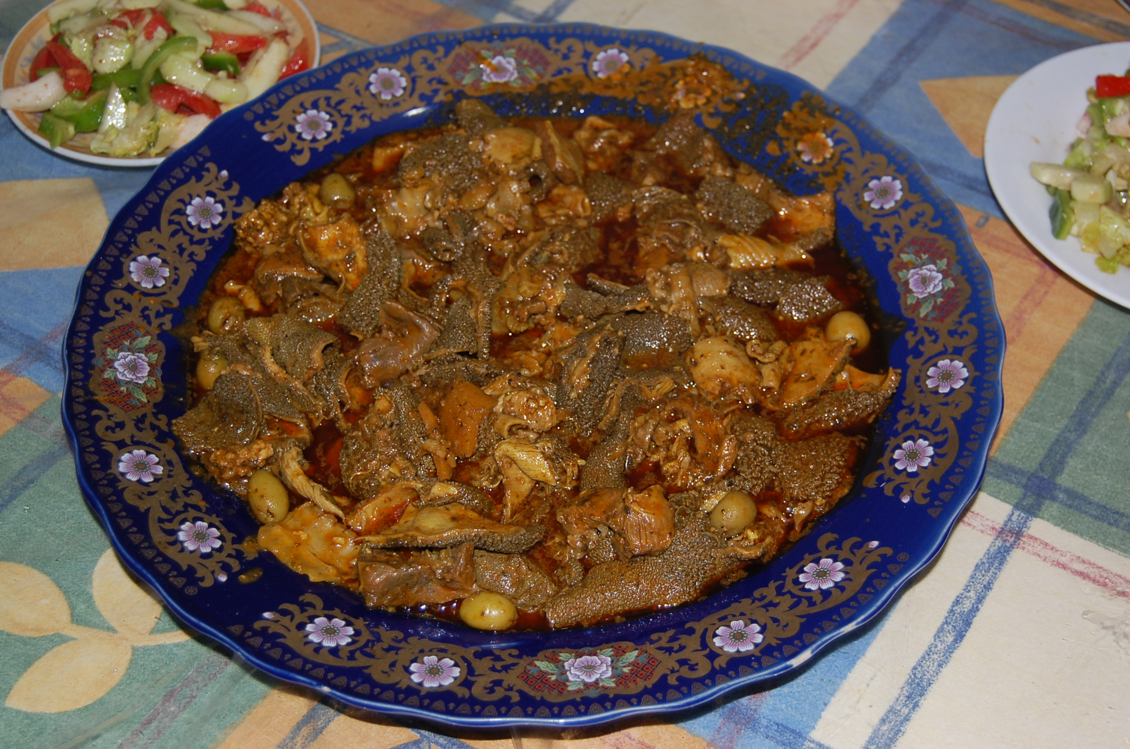 Walon: hatchisse di panse di bedot (chkamba) presse a magnîلمغربية: شكمبة موجودة